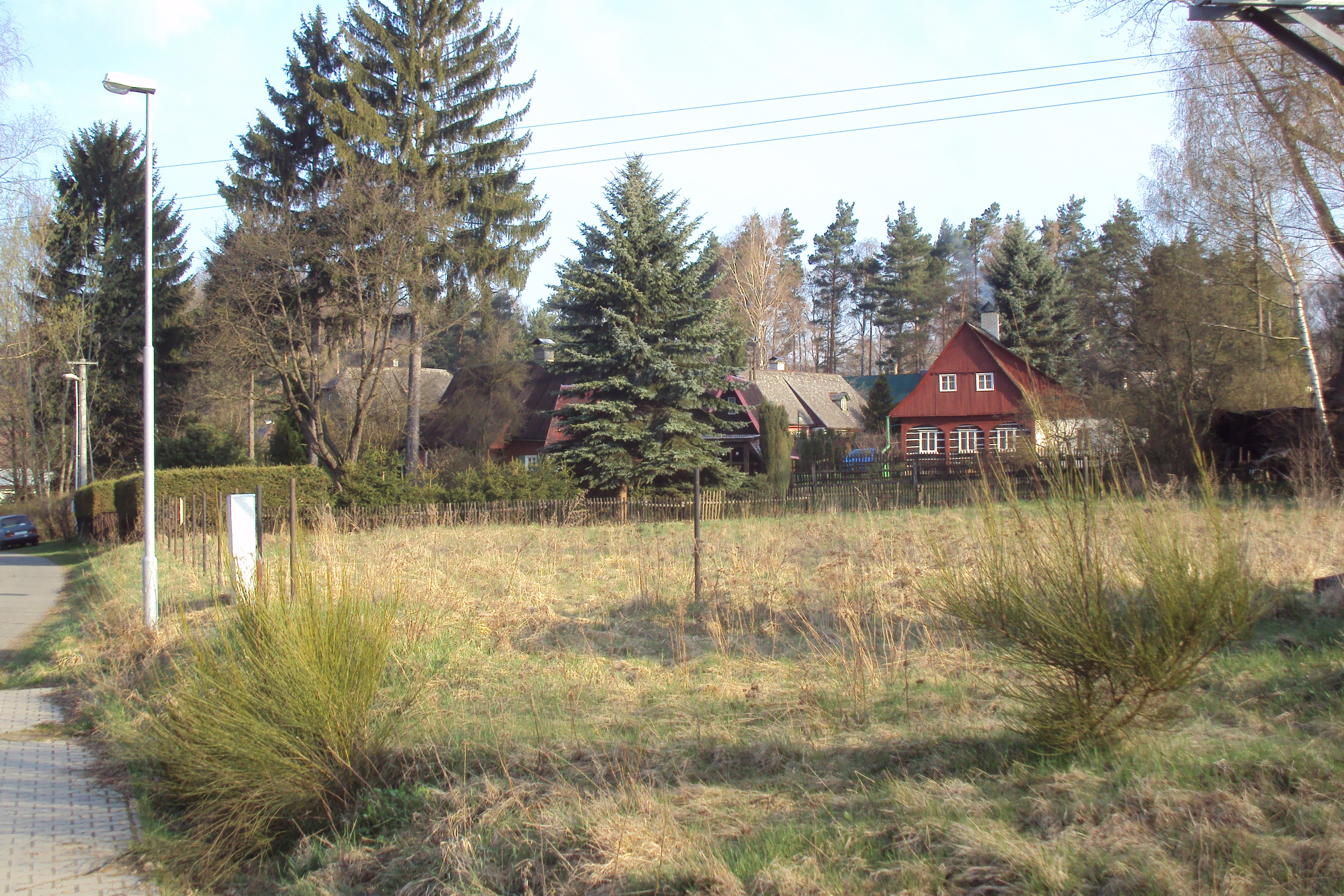 Stavení v obci Maxov u Radvance